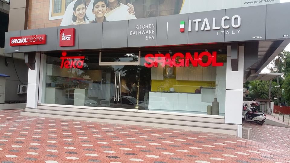 Showroom de Teka en India